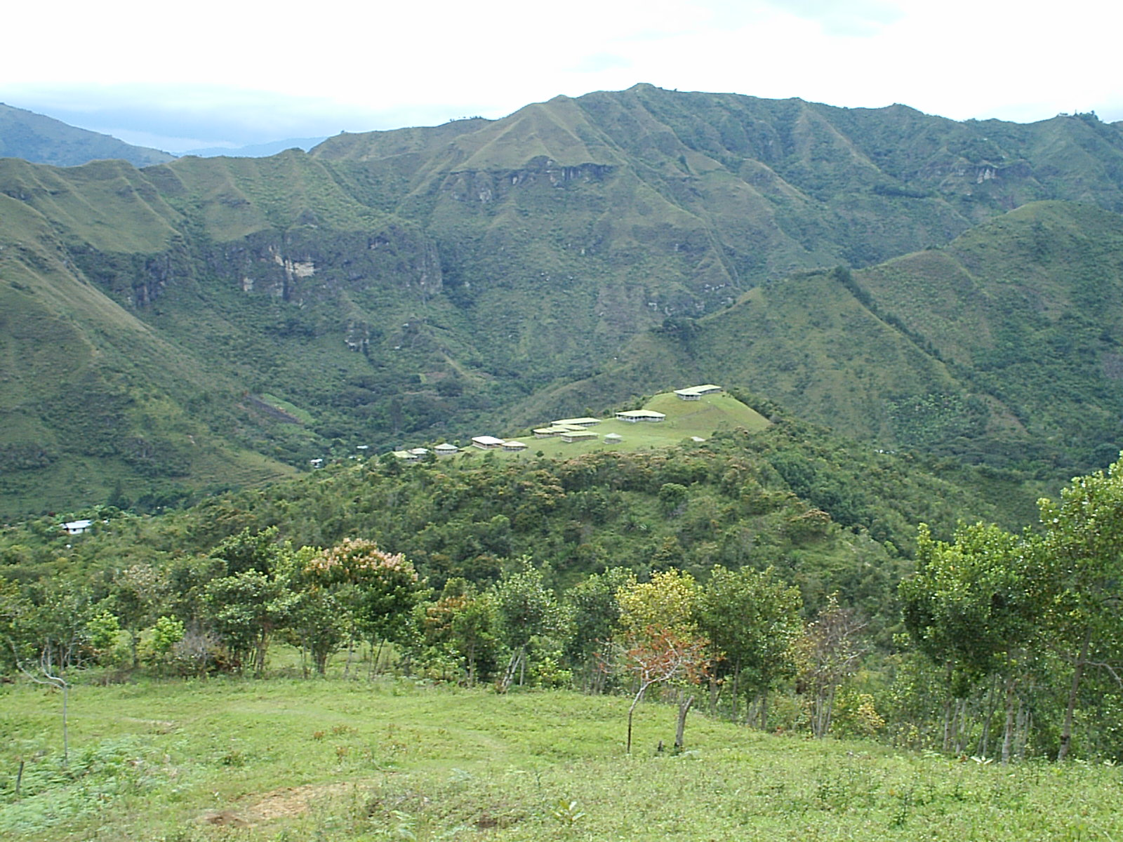 Parque Arqueológico de Tierradentro